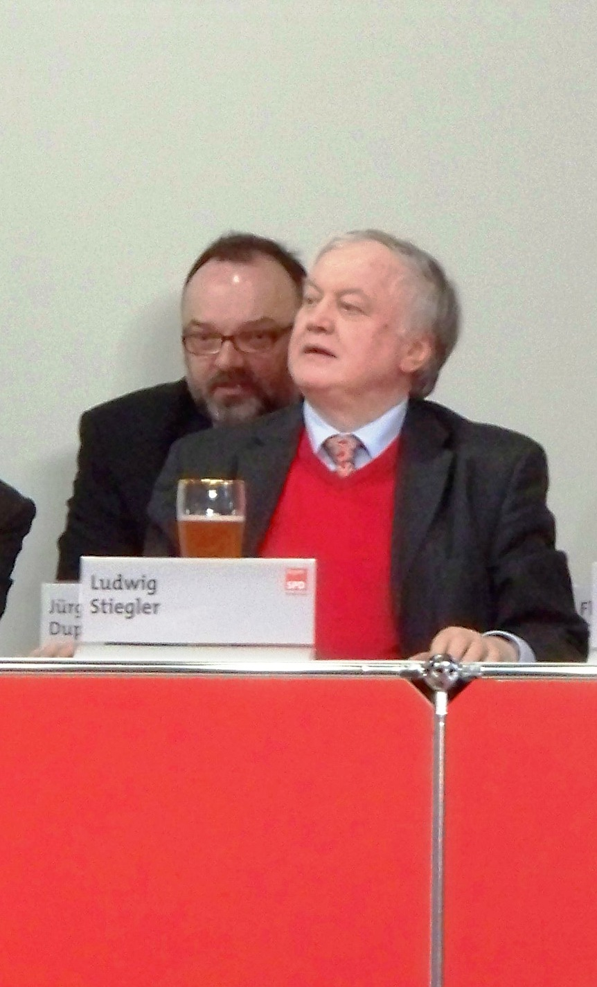 Ludwig Stiegler beim Politischen Aschermittwoch in Vilshofen an der Donau 2009.